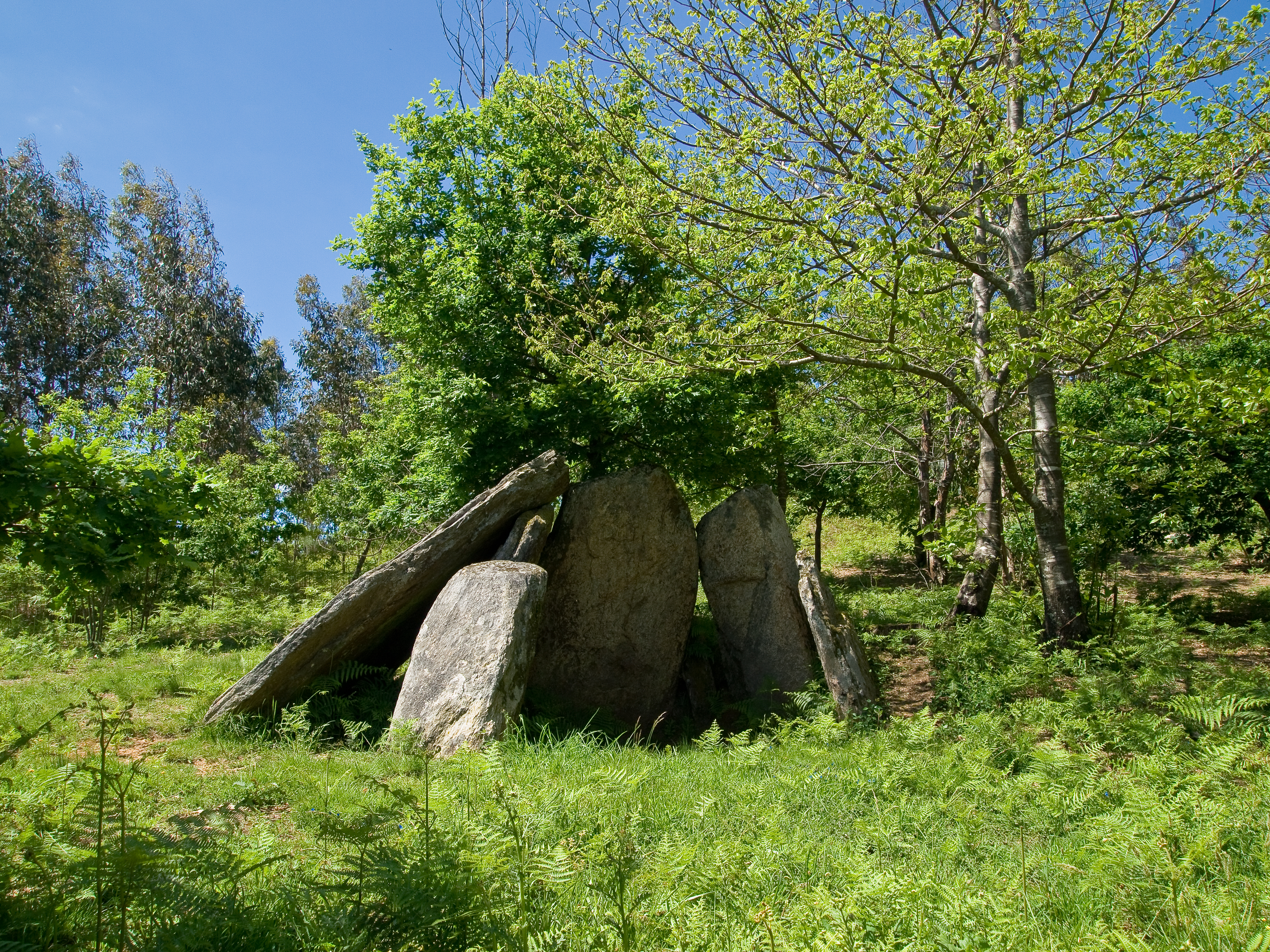 A Casa dos Mouros - Candeán - Vigo 42,244451 / -8,673815